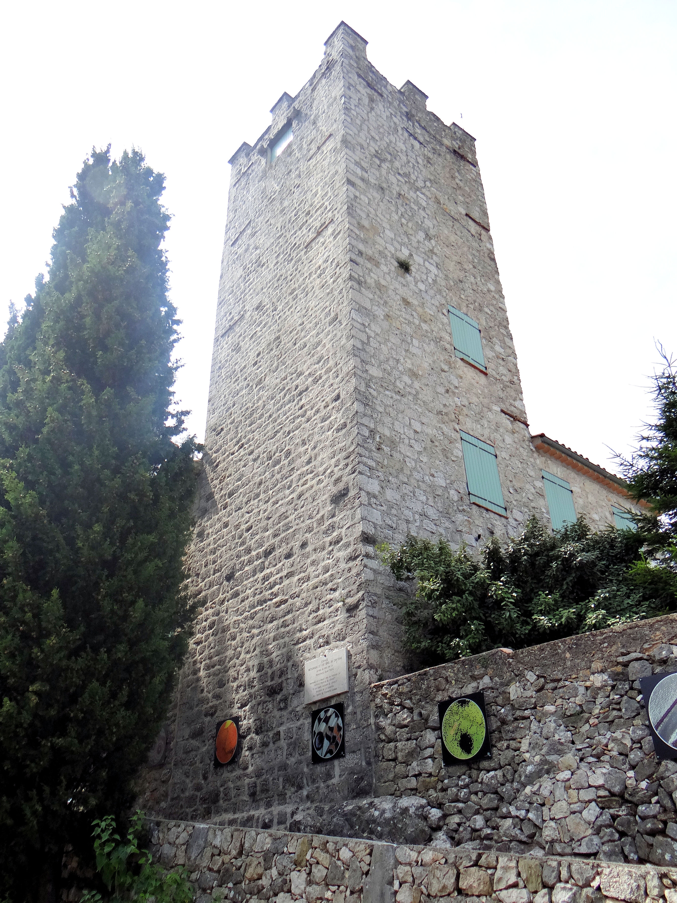 Tourrette-Levens - Château - Le donjon